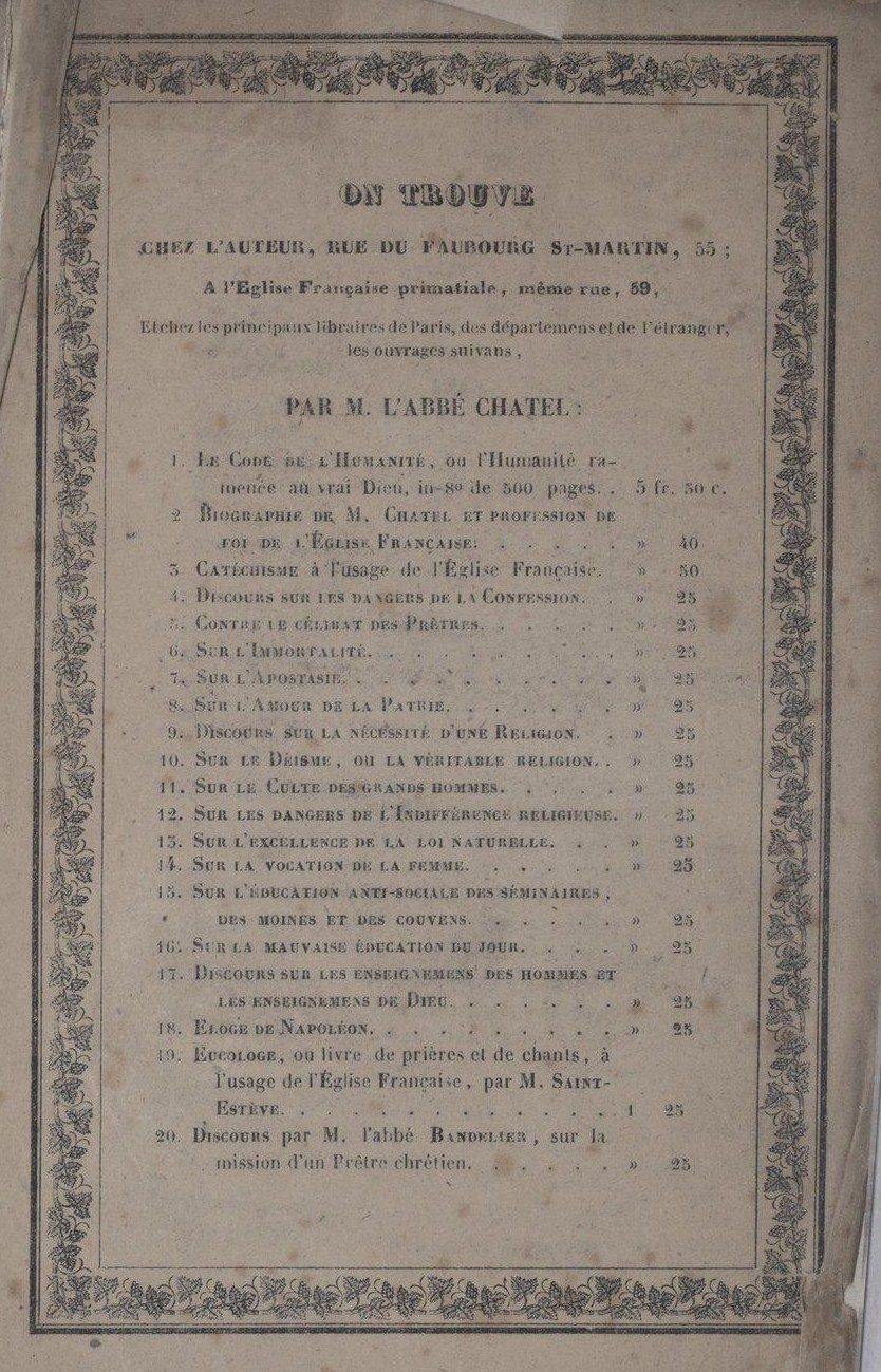 Liste d'ouvrages